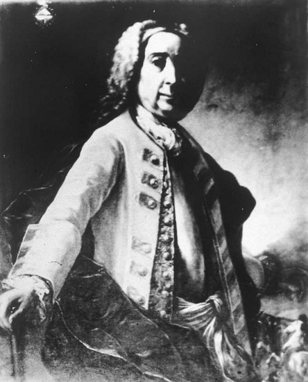 1er marqués de Ariany